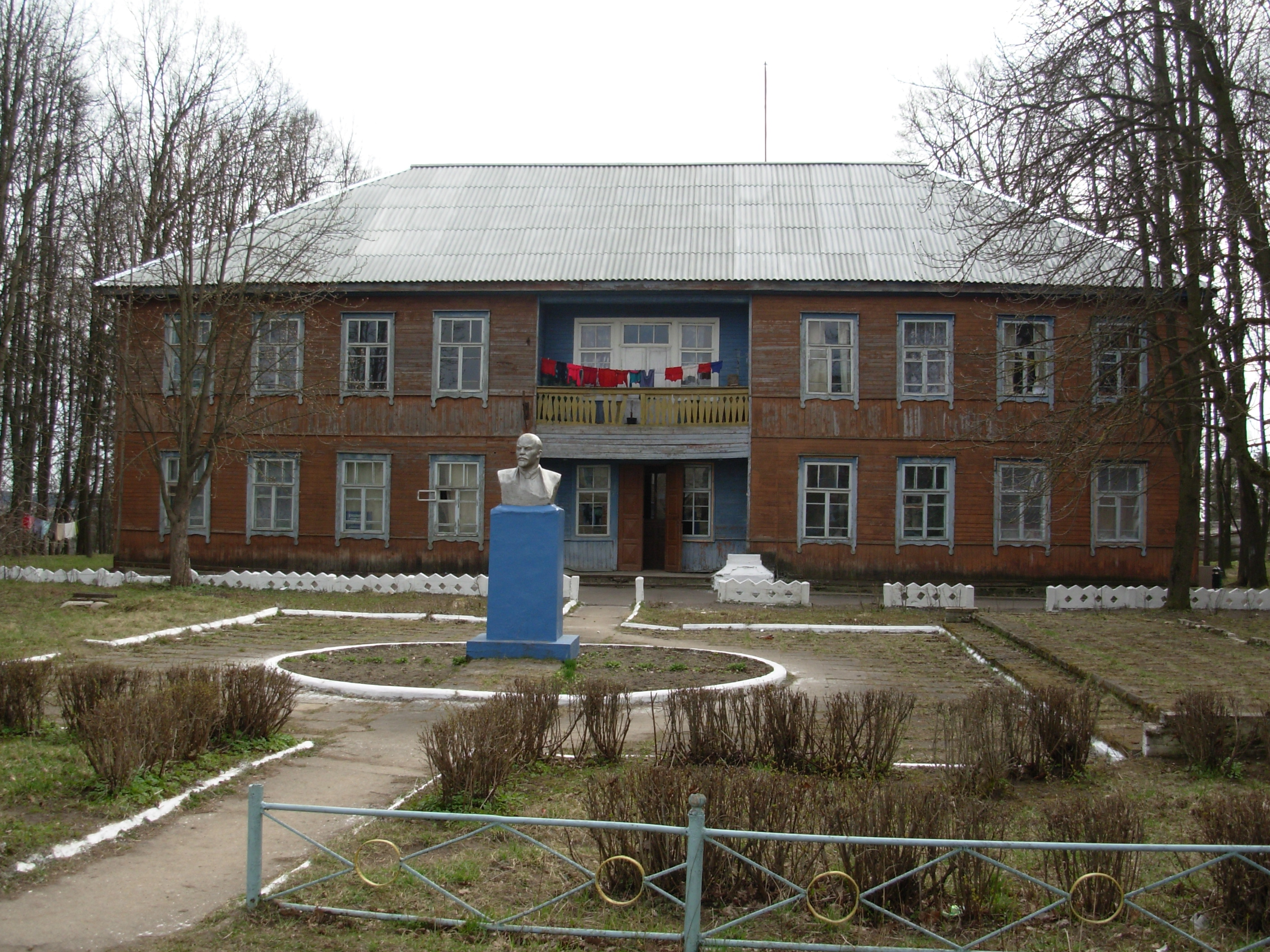 Беларуская (тарашкевіца): Драўляная двухпавярховая былая кантора, пабудаваная ў 1947 годзе - самы стары на сёньня будынак у Вусьці